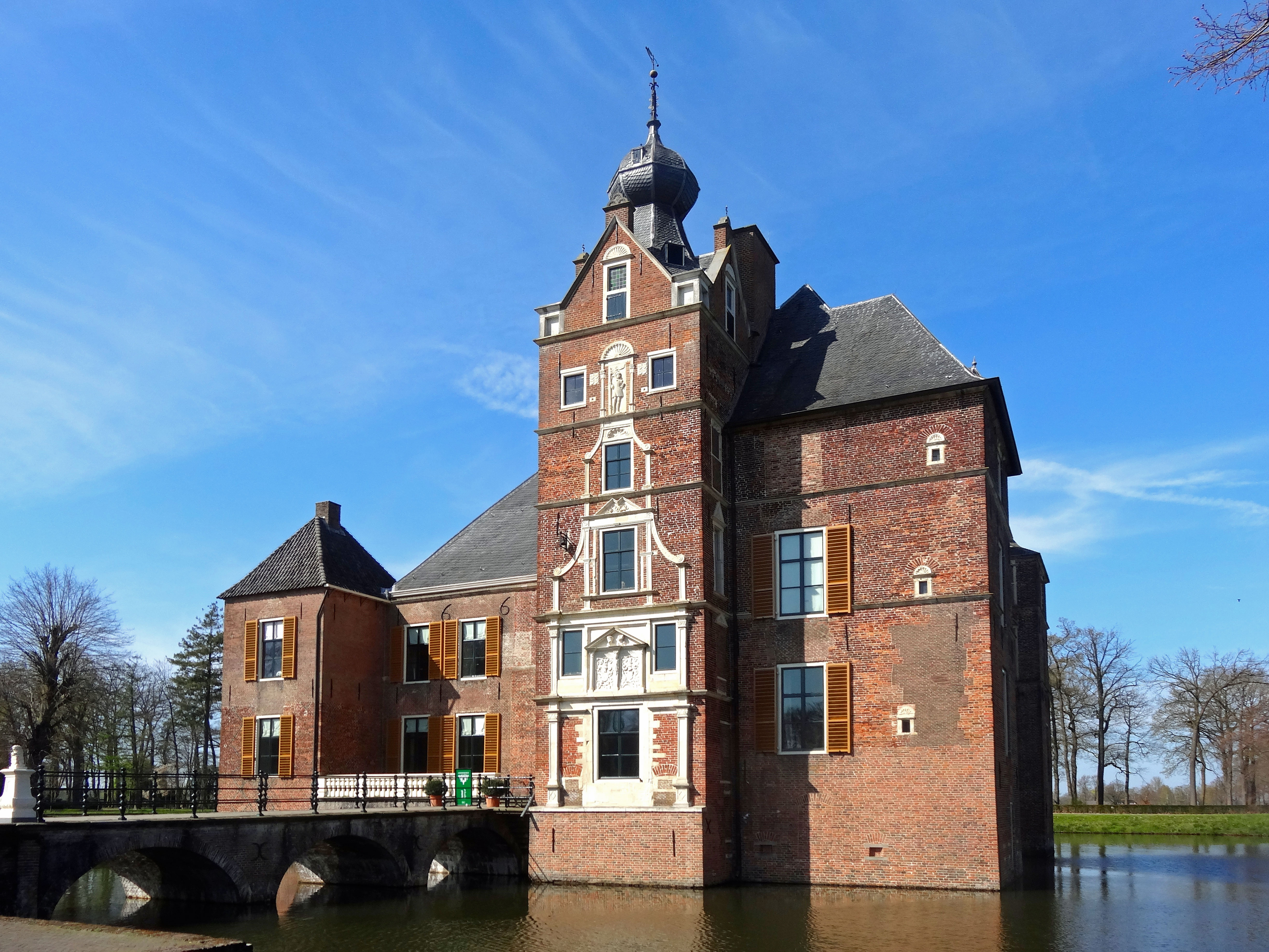 Kasteel de Cannenburgh in Vaassen